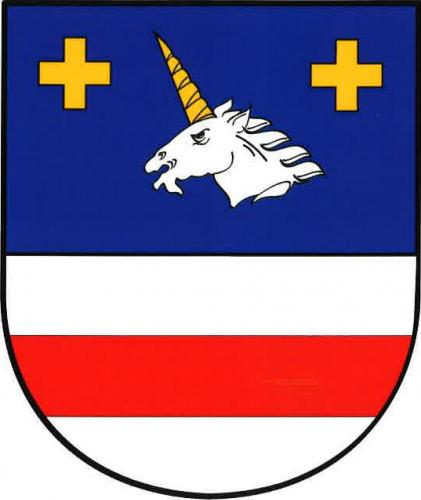 Znak, Tatrovice, okres Sokolov